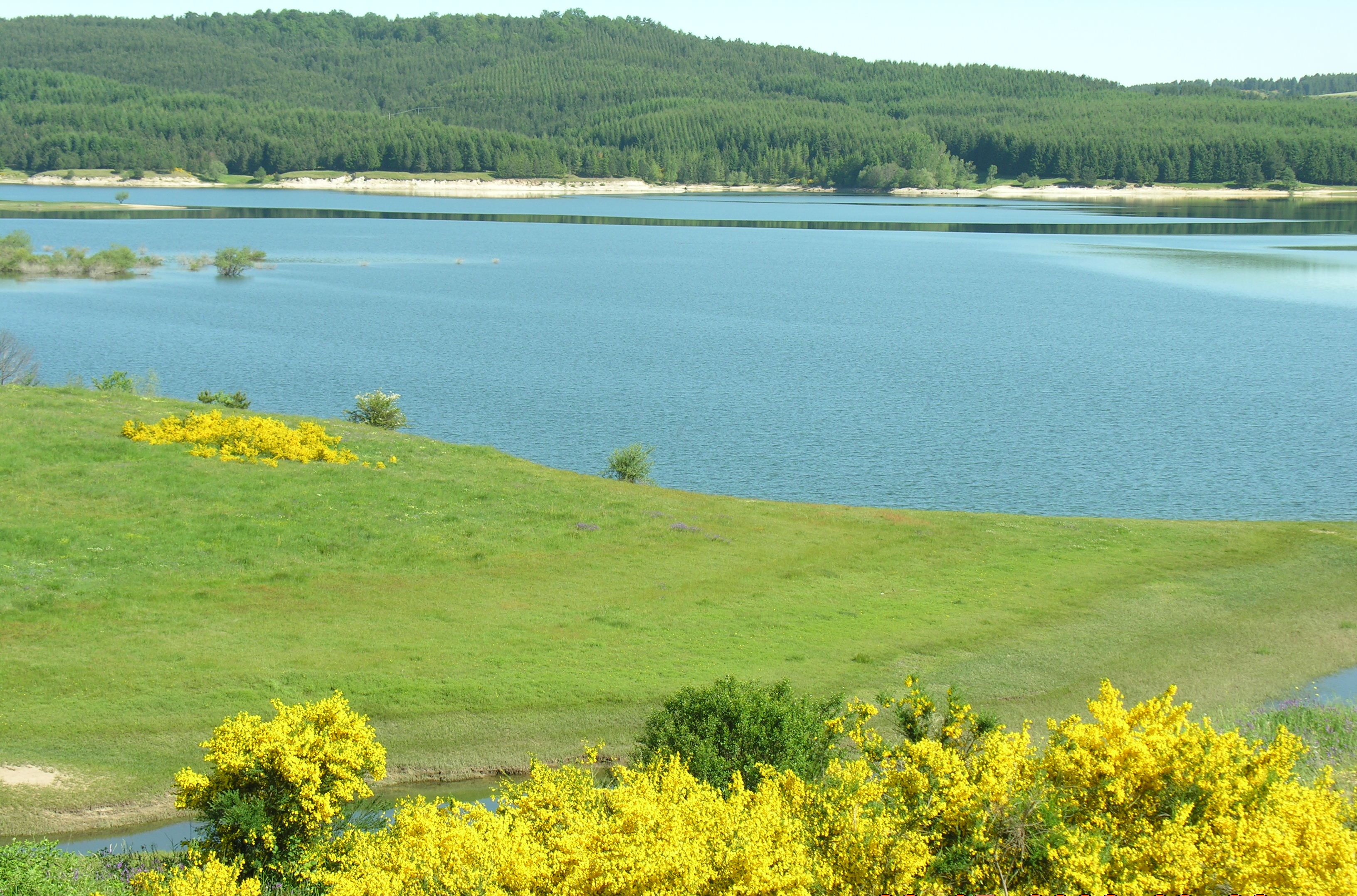 Veduta del lago Ceciìta nei pressi del Cupone